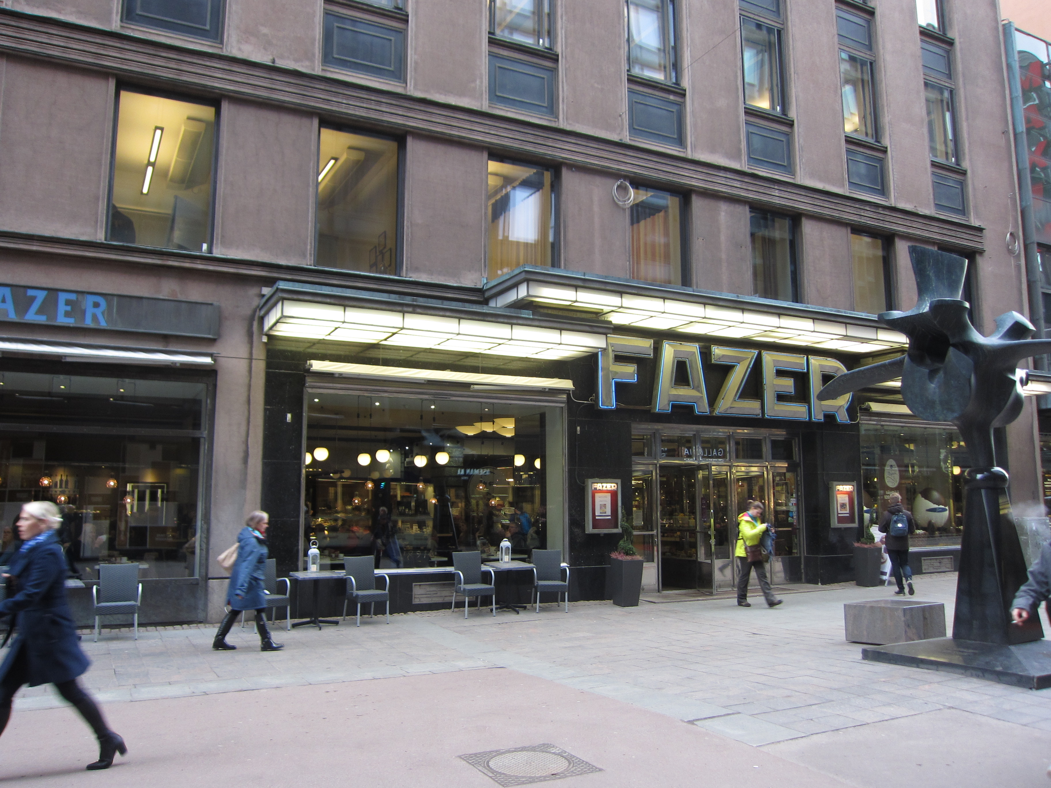 Karl Fazer Café (Kluuvikatu 3,00100 Helsinki,Finnland)